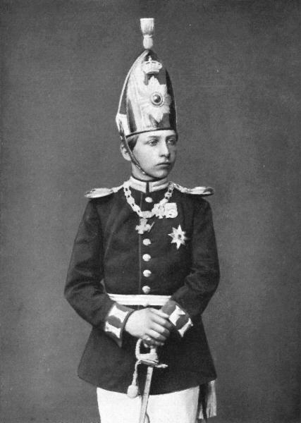 Prinz Wilhelm, 1874